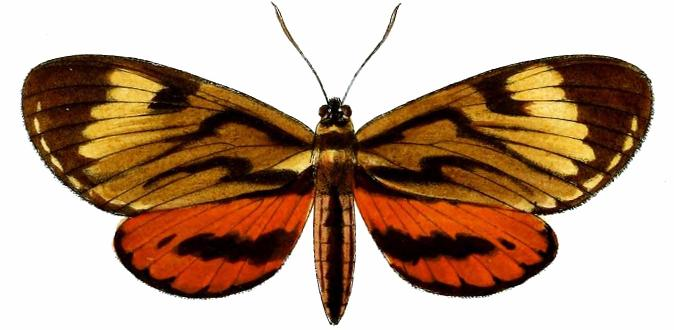 Castnia mars = Duboisvalia cononia cononia (Westwood, 1877)